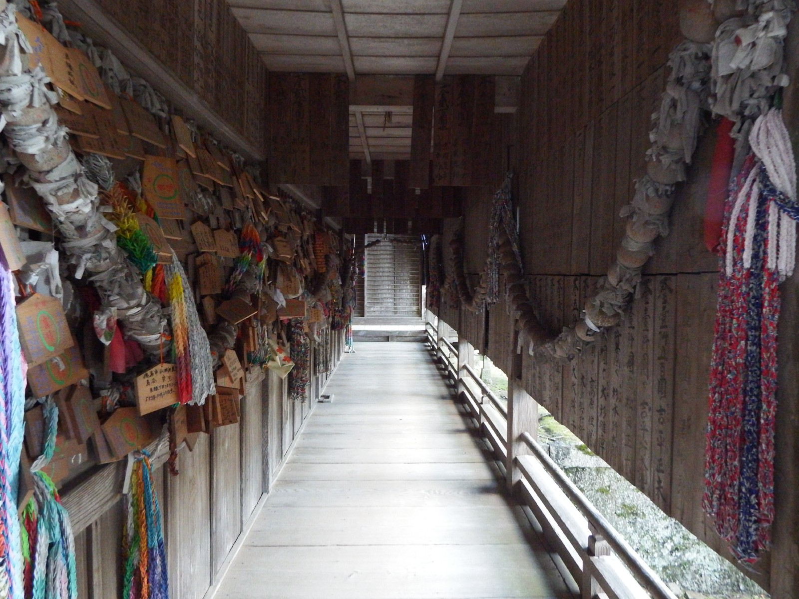 大山寺の回廊